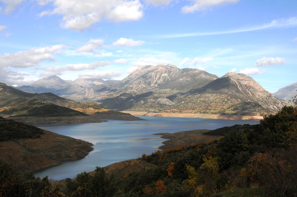 Mornou Lake